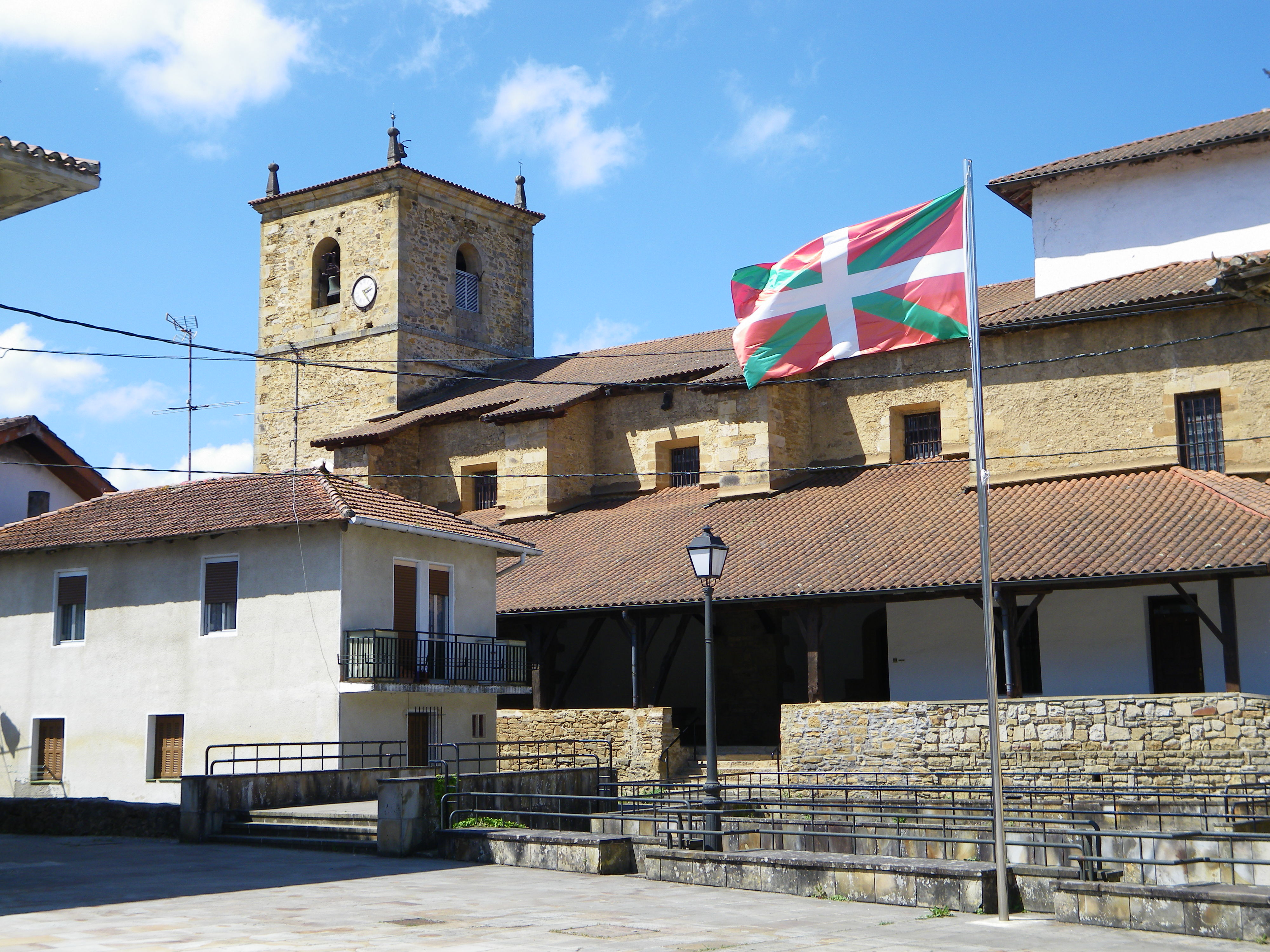 San Bizente Martiria eliza, Ugarte auzoa, Muxika, Bizkaia.